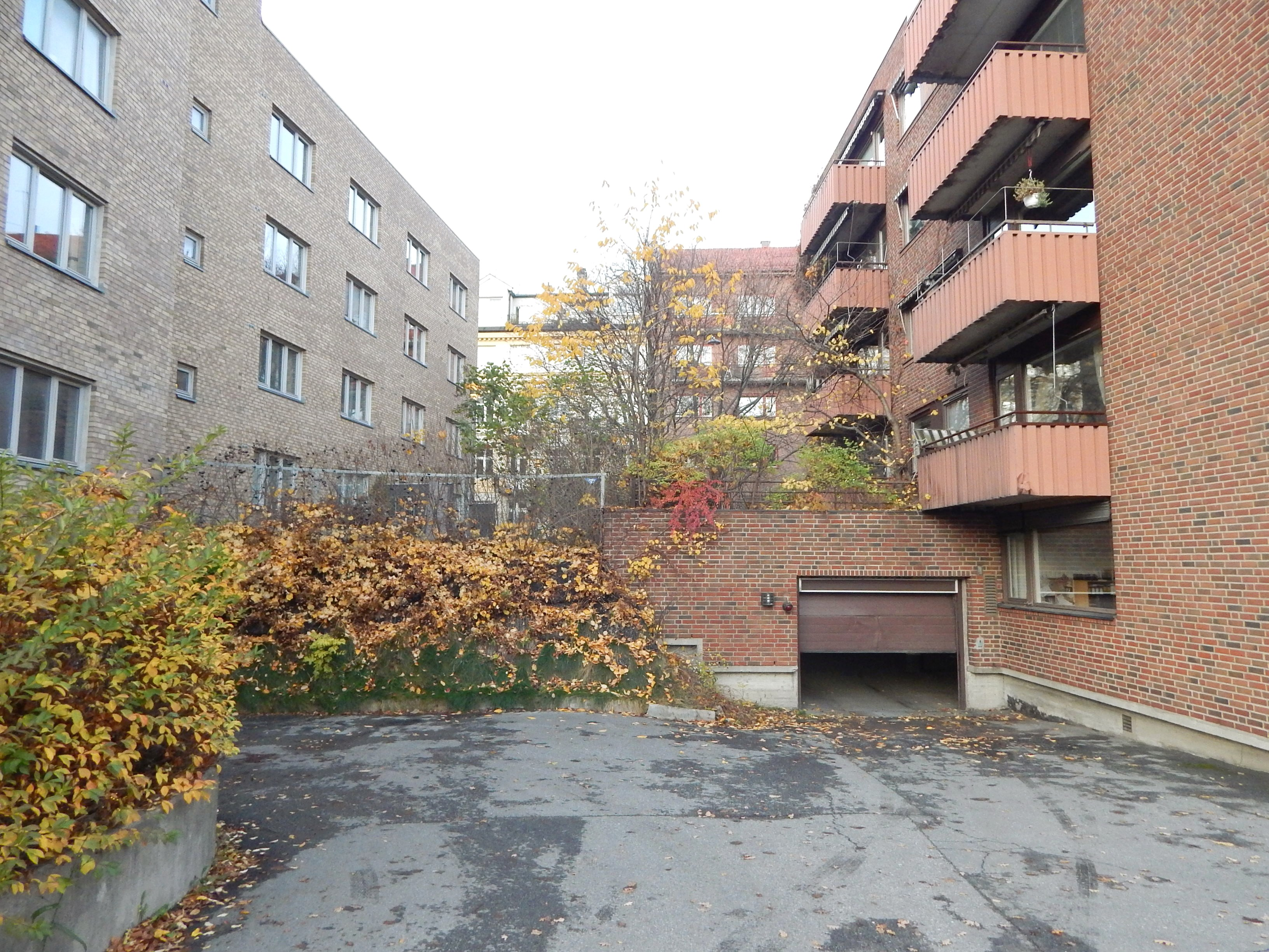 Karl Hals' gate gikk gjennom området mellom disse to blokkene.